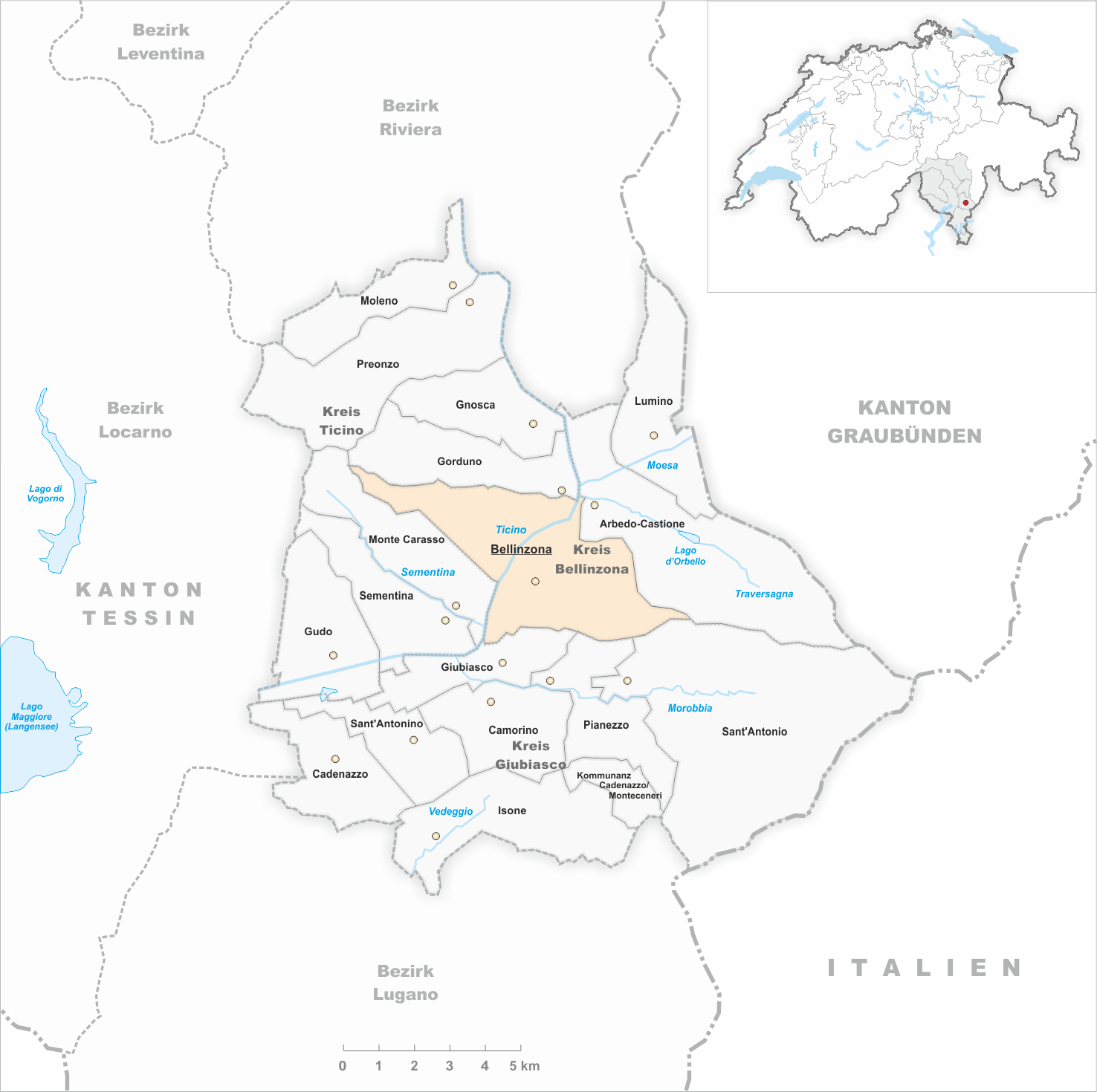 Municipality Bellinzona